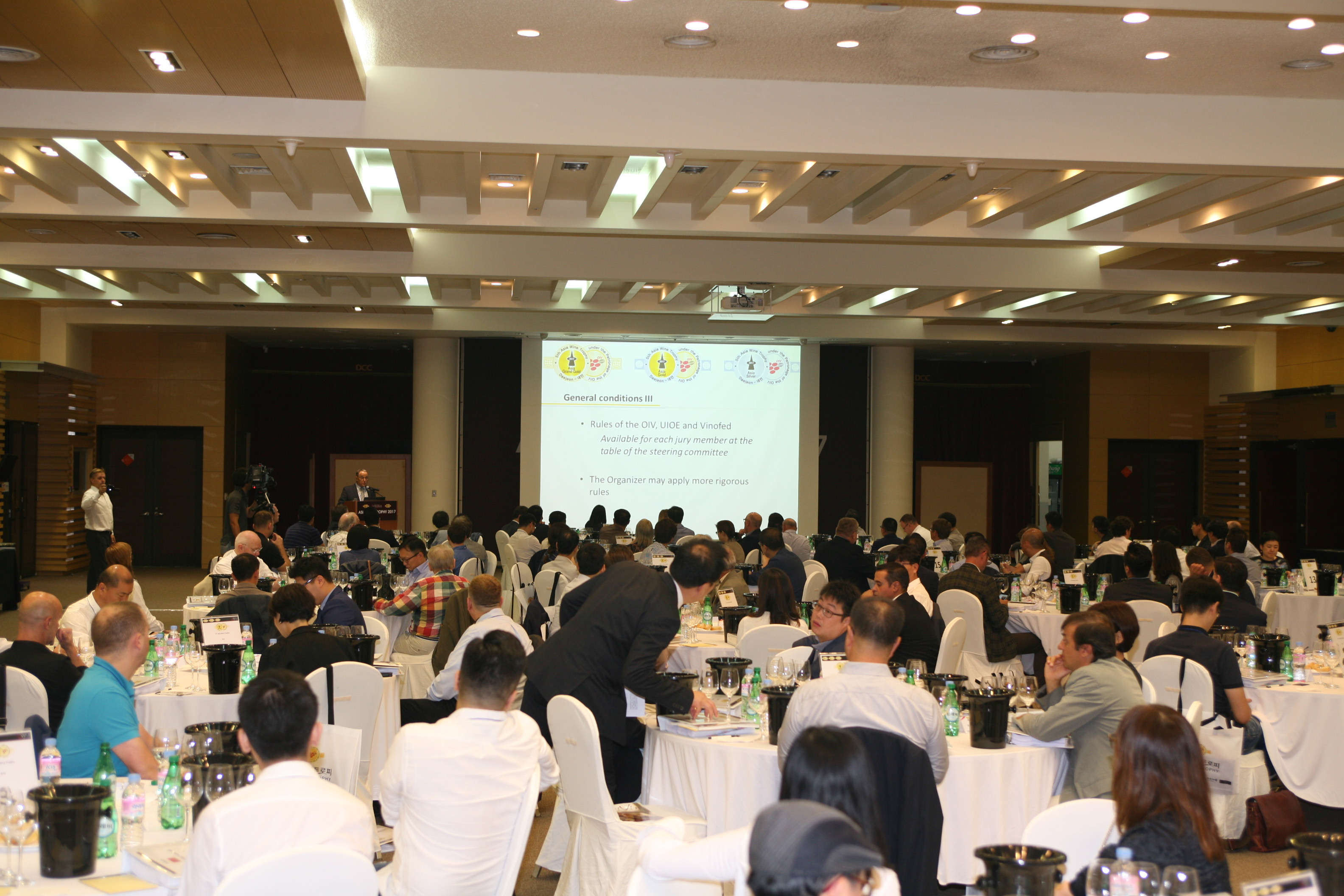 2017 대전국제와인페스티벌 3